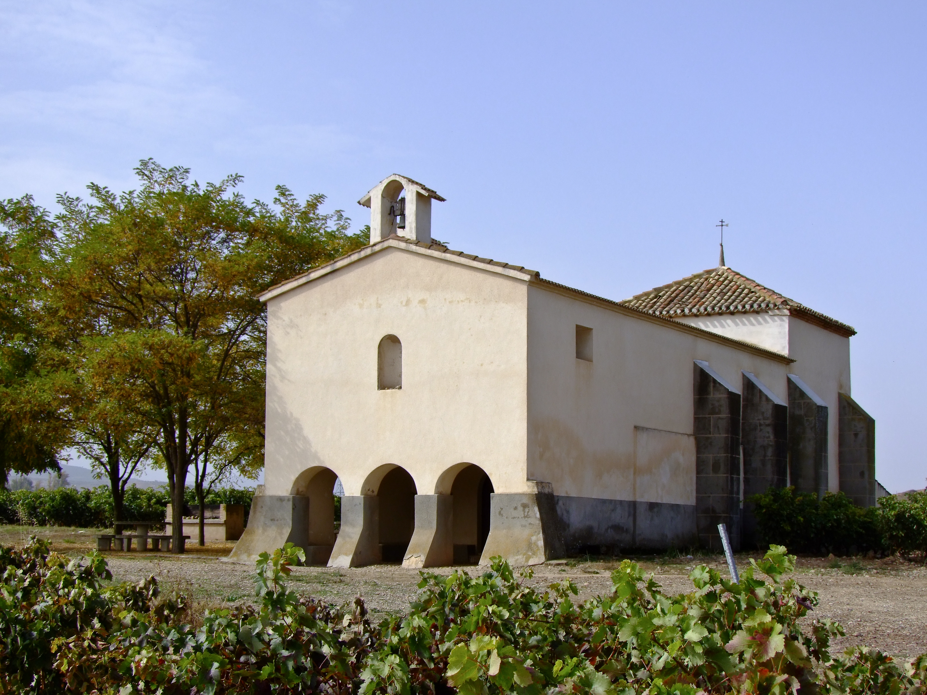 Ermita de Santa Maria de la Anmtigua en la localidad de Ausejo, La Rioja - España